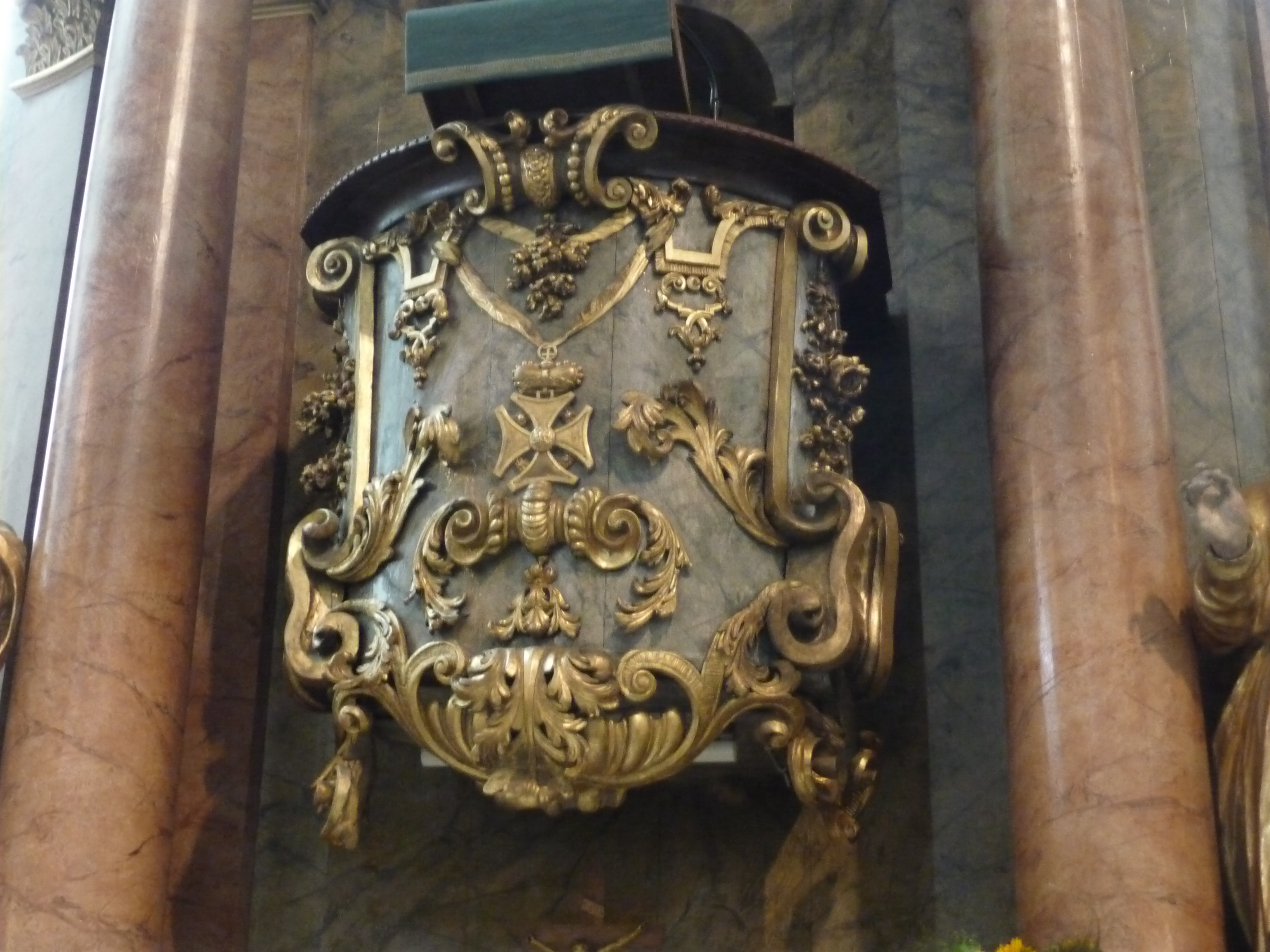 Kanzel im Himmelkroner Kanzelaltar, Ornamente weisen auf den Roten-Adler-Orden hin